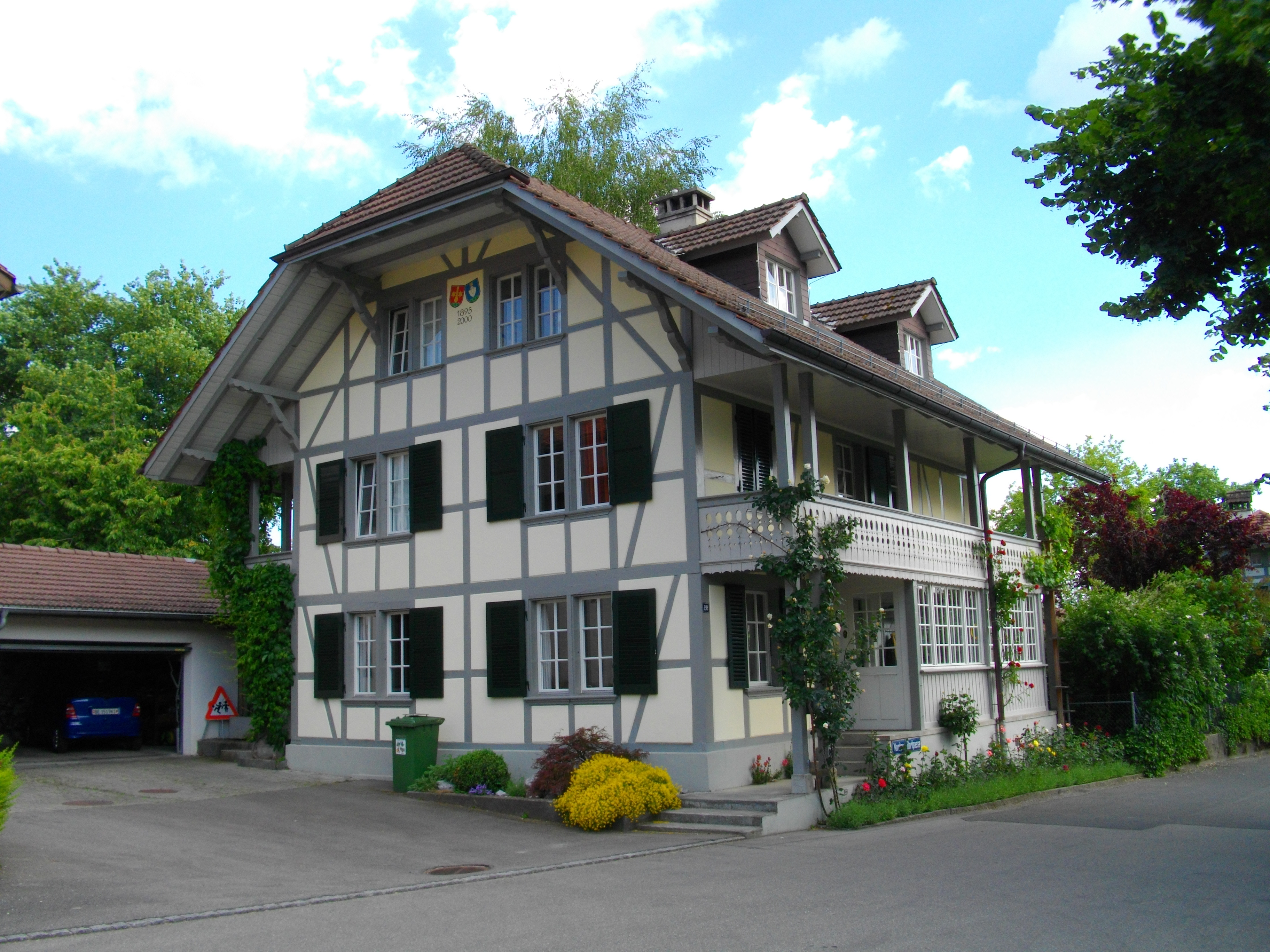 Casa en Gümligen